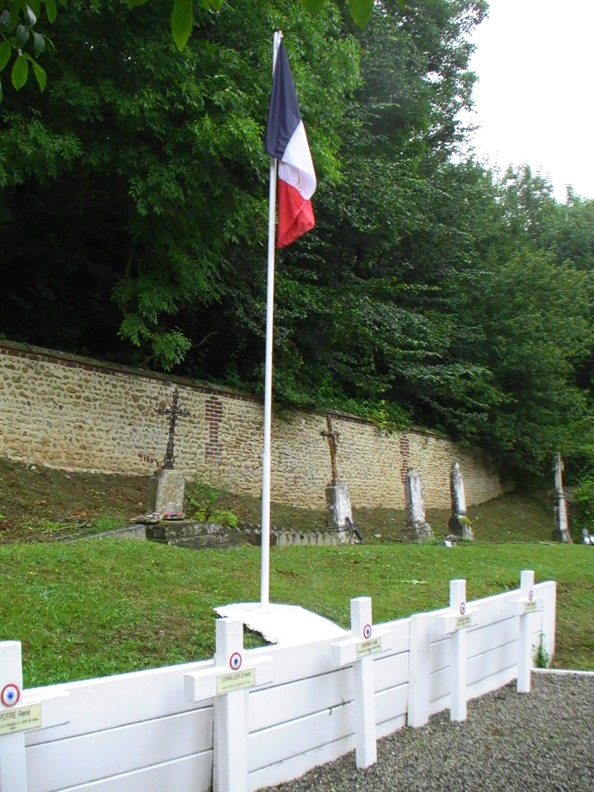 Enclos de l'église Saint-Georges d'Aubevoye - carré militaire - guerre1914-1918